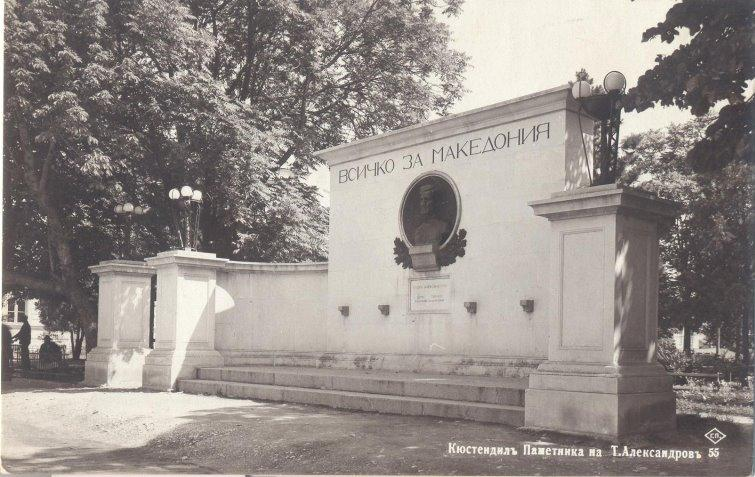 Паметникът на Тодор Александров в Кюстендил